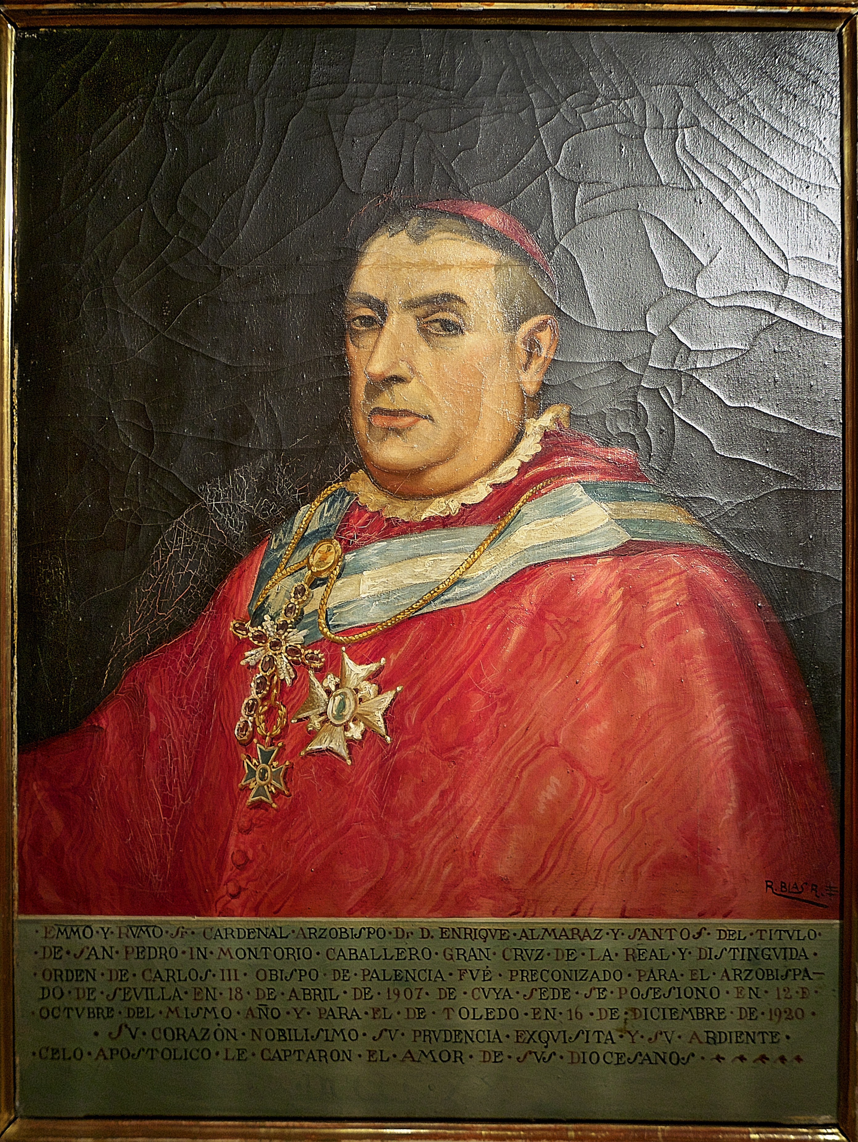 Retrato de Enrique Almaraz Santos, óleo sobre lienzo, arzobispo de Toledo y Sevilla, por Rafael Blas Rodríguez (1885-1971).